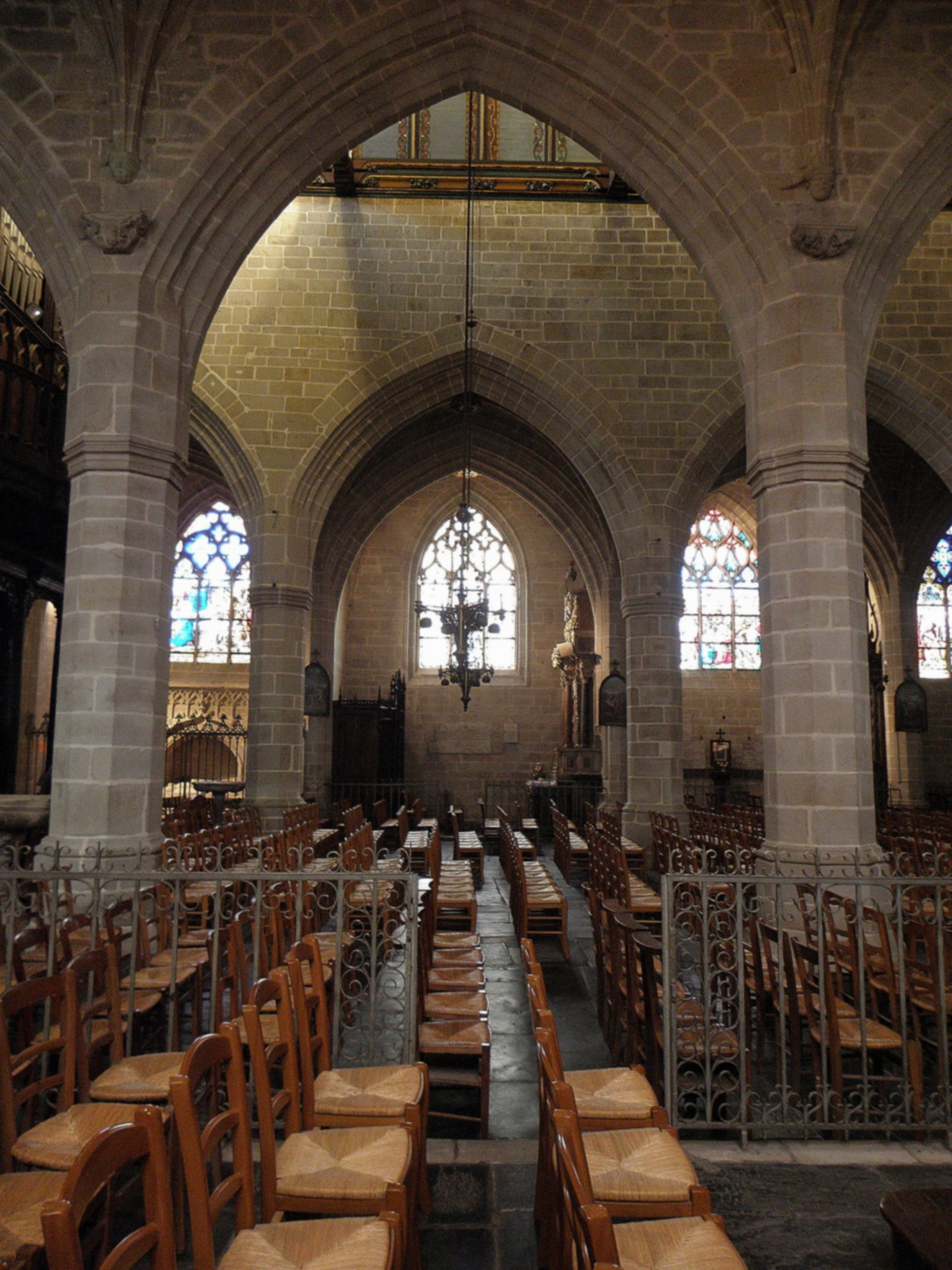 Église Notre-Dame de Vitré (35). Vue traversante de la nef en direction du septentrion.